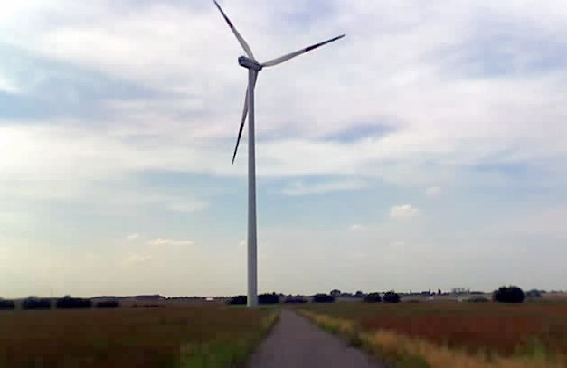 Windmühle